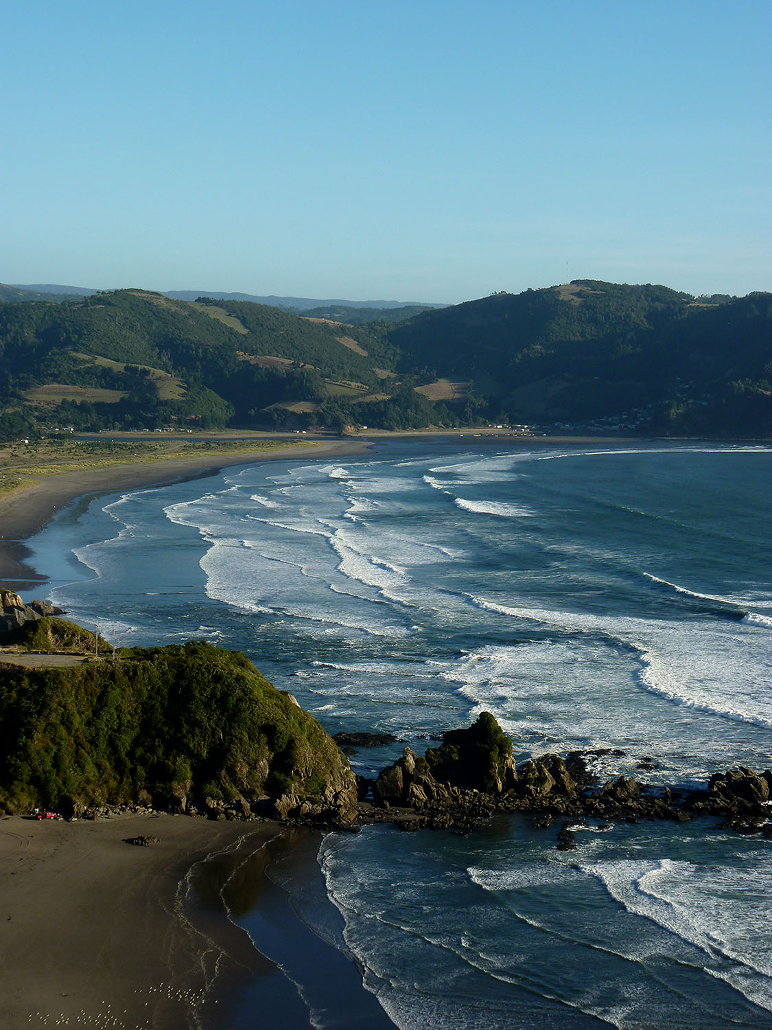 Paisaje Costa Mehuin, Queule, región de los lagos, 10. región